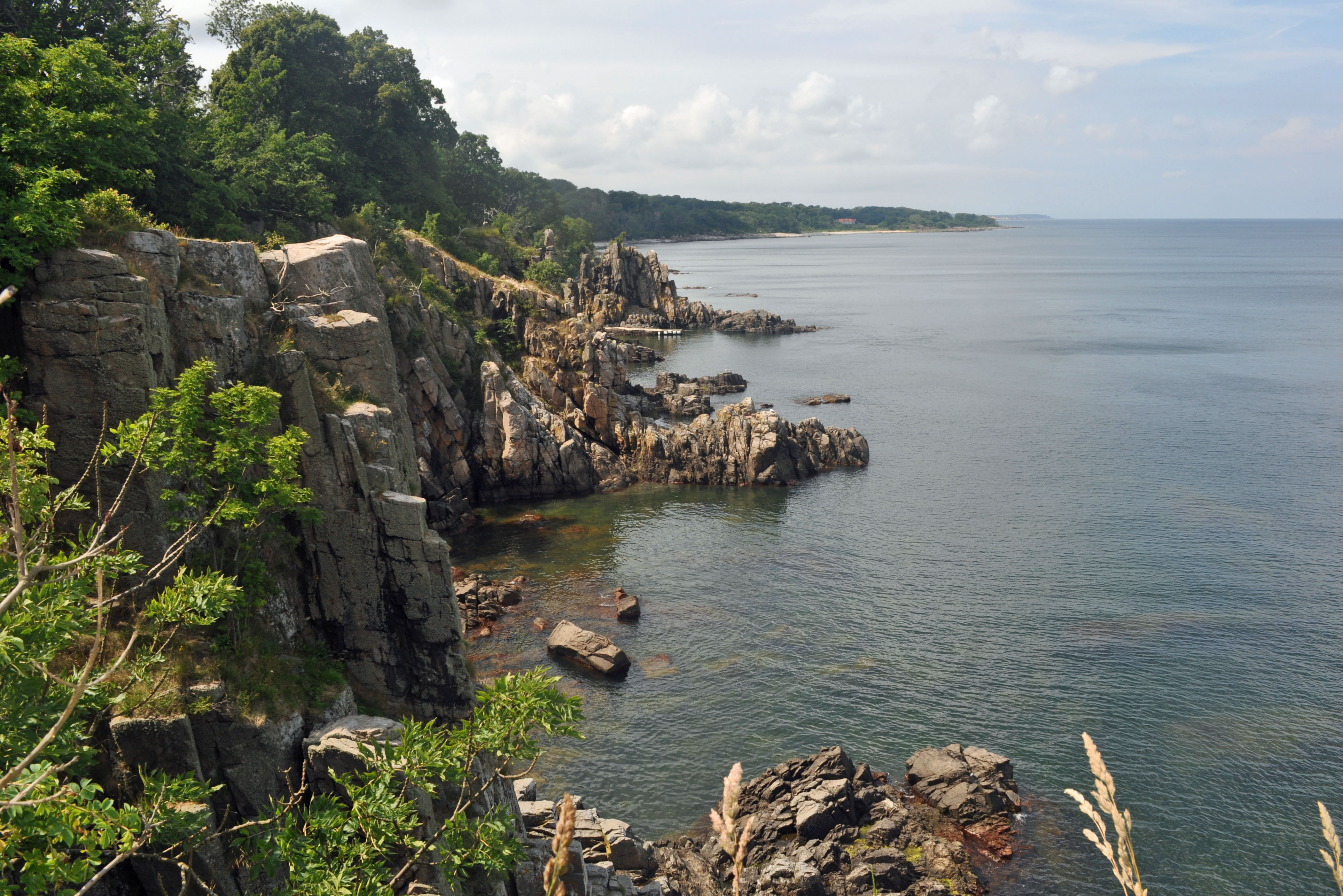 Heligdomsklipperne, Bornholm (2012-07-11), by Klugschnacker in Wikipedia (12)